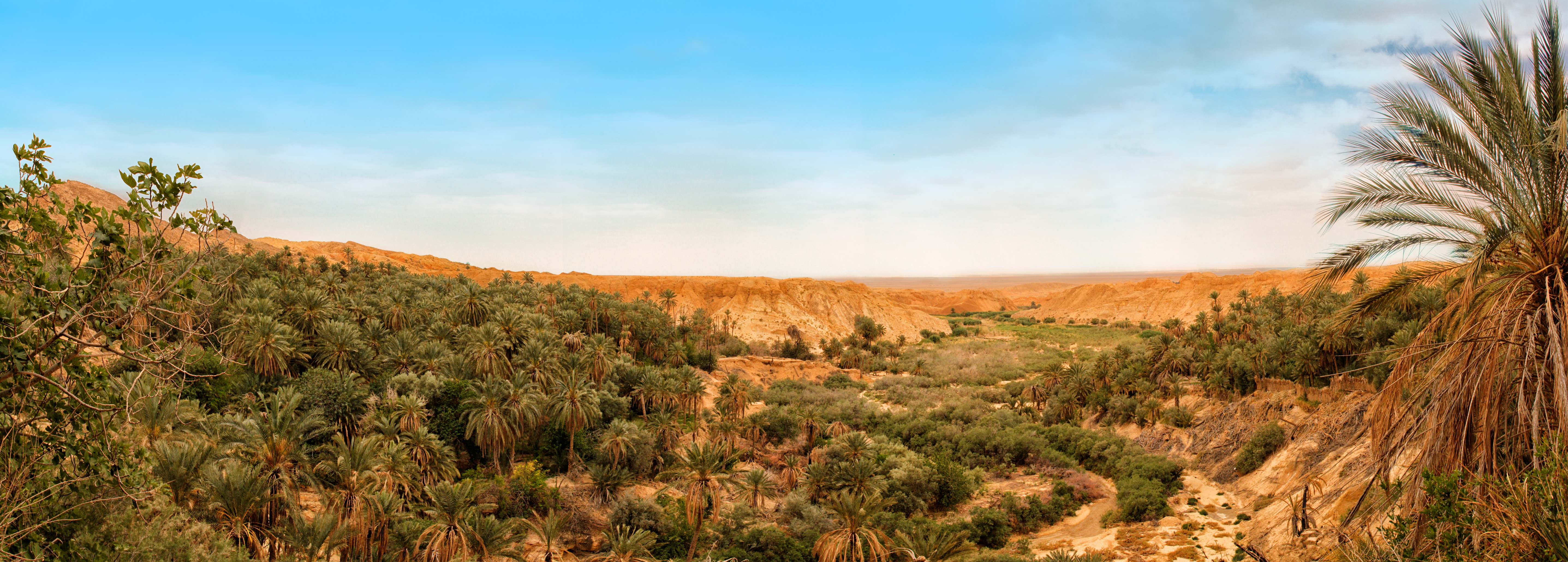 الواحة المقابلة لميدنة نقرين القديمة